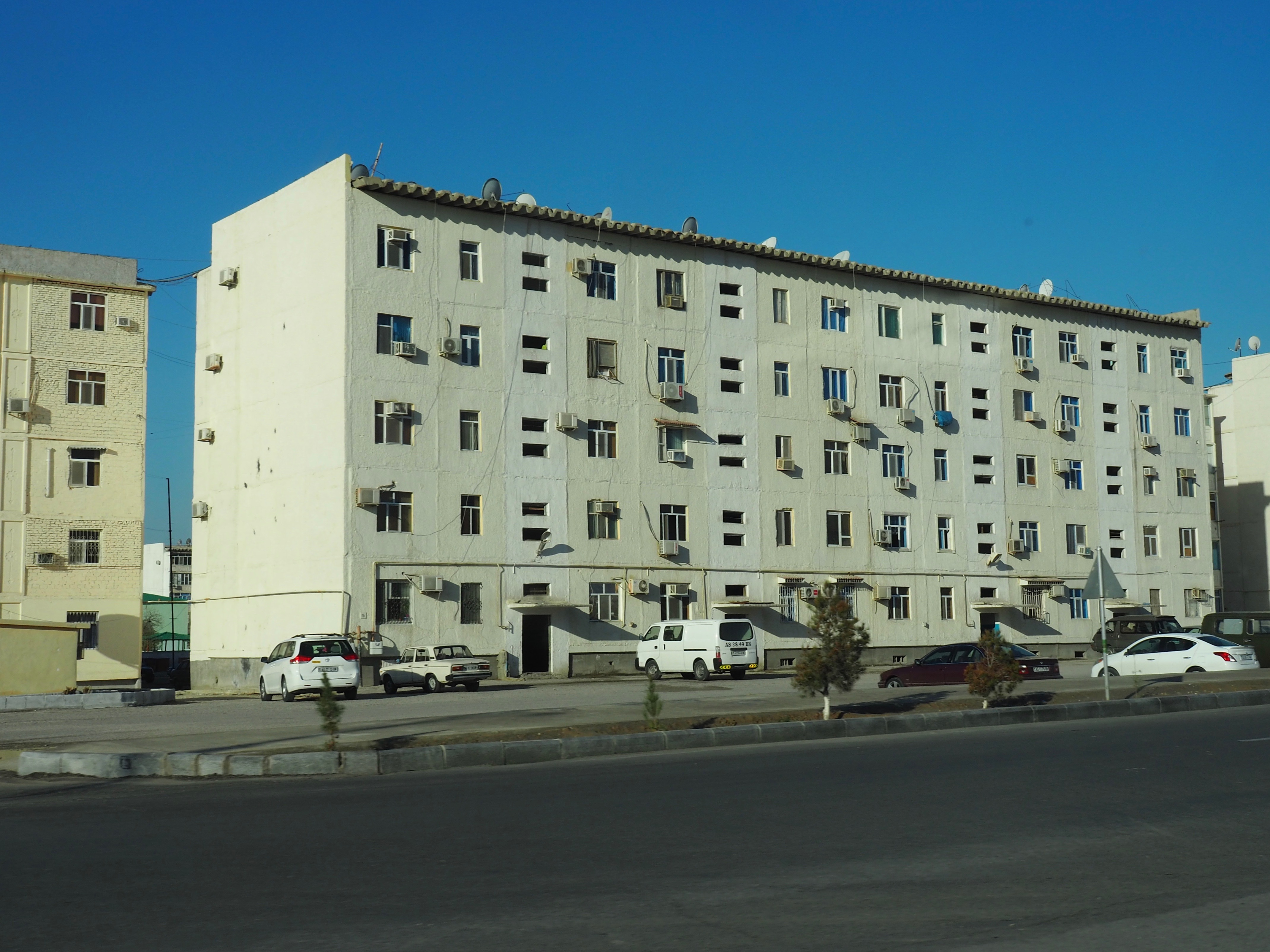 Balkanabat